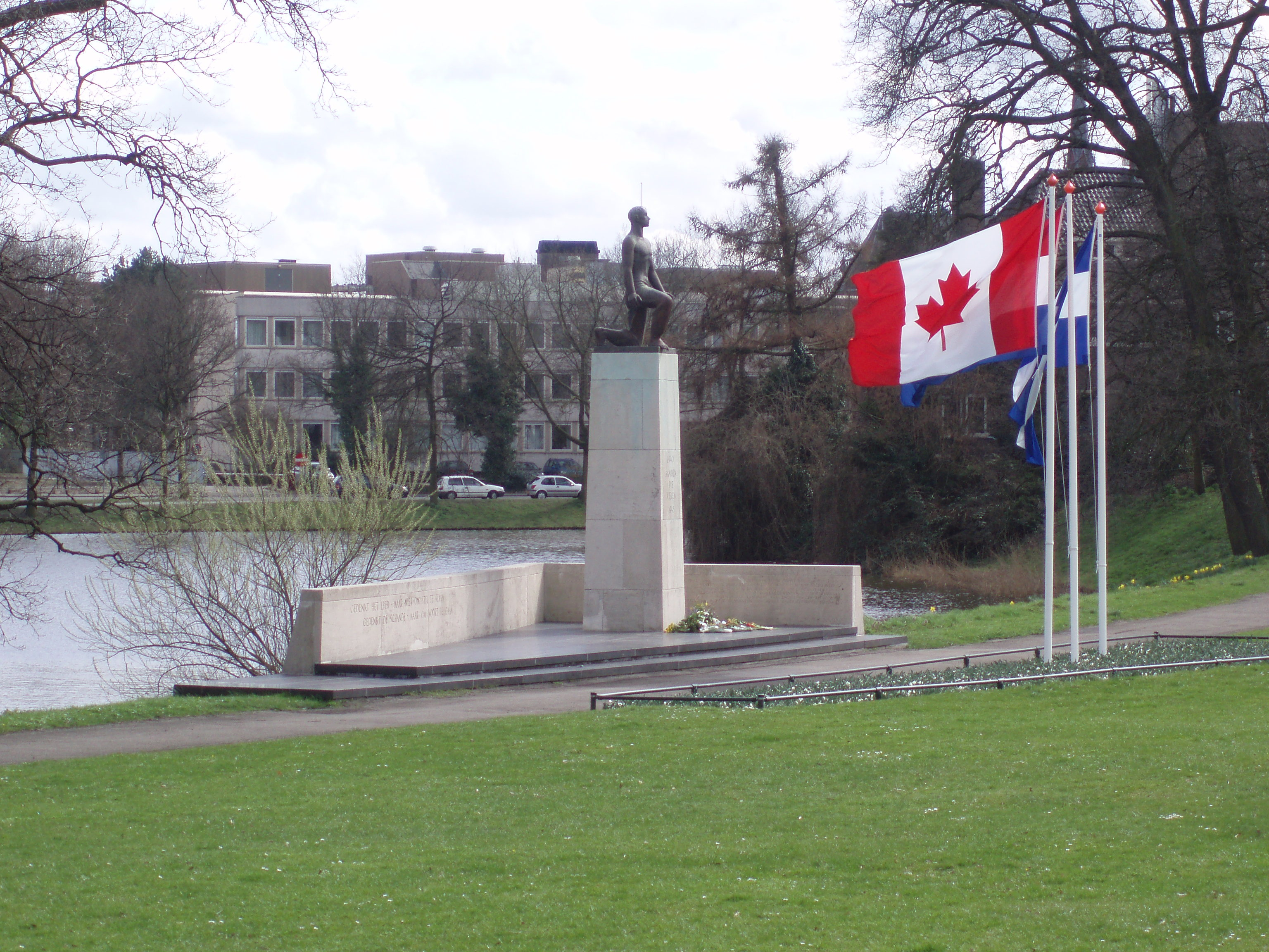 Oorlogsmonument Zwolle. Met dichtregels van Victor E. van Vriesland